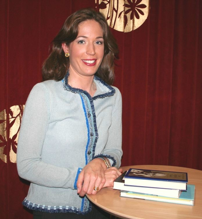 Felicitas von Lovenberg nach einer Aufzeichnung von Literatur im Foyer im Mainzer SWR-Funkhaus